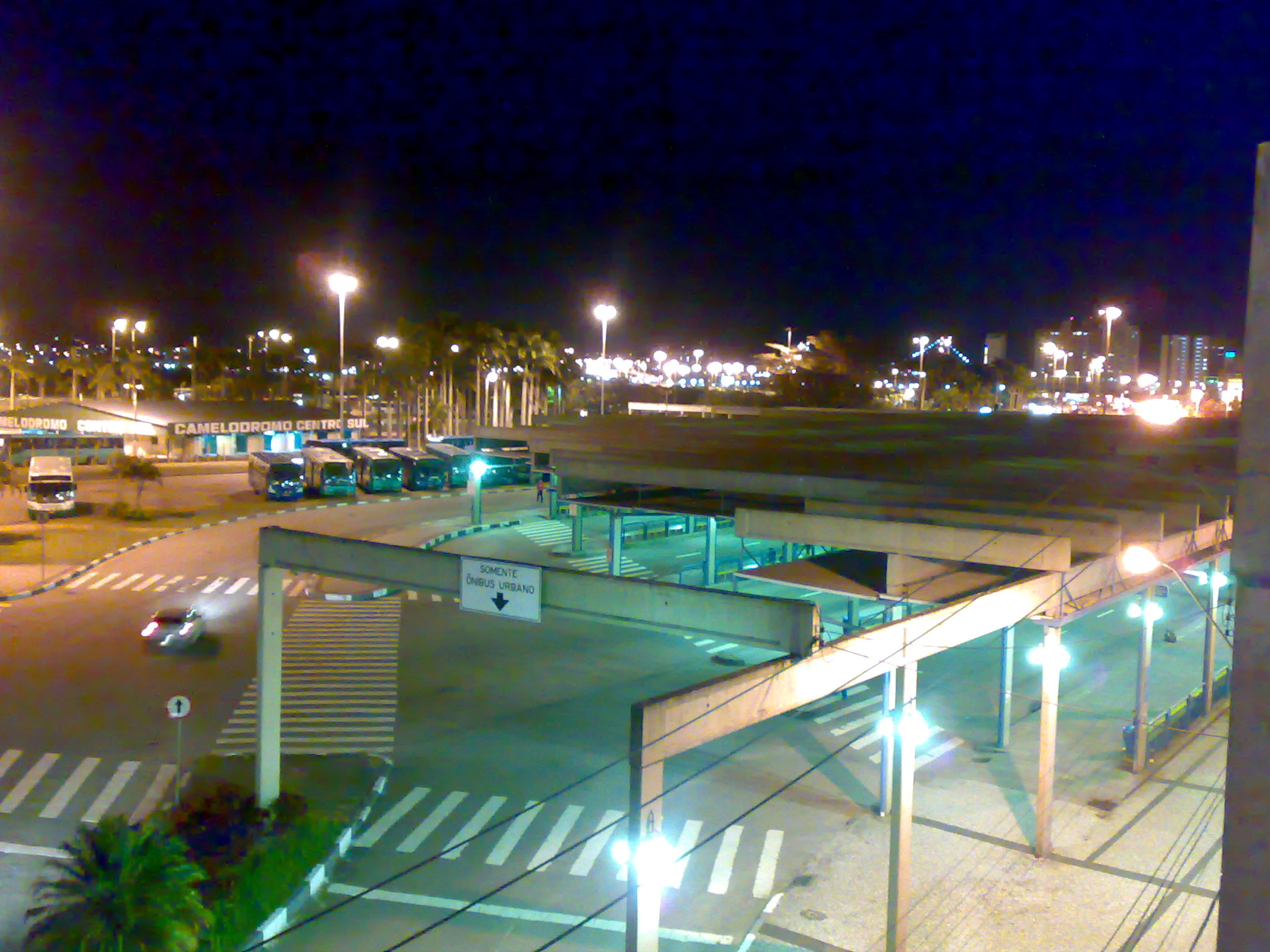 Terminal Urbano de Florianópolis(antigo)